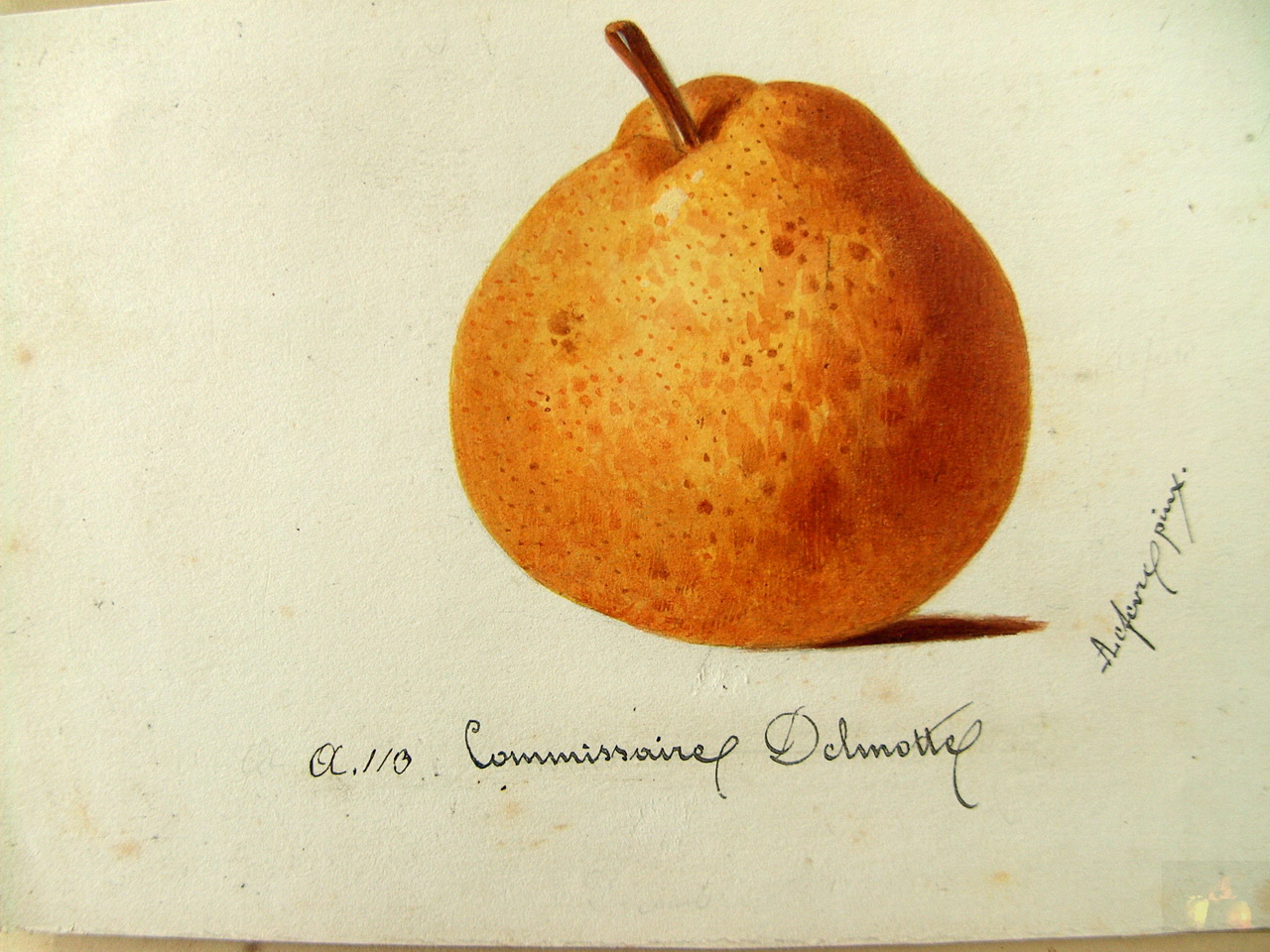 CommissaireDelmotte.